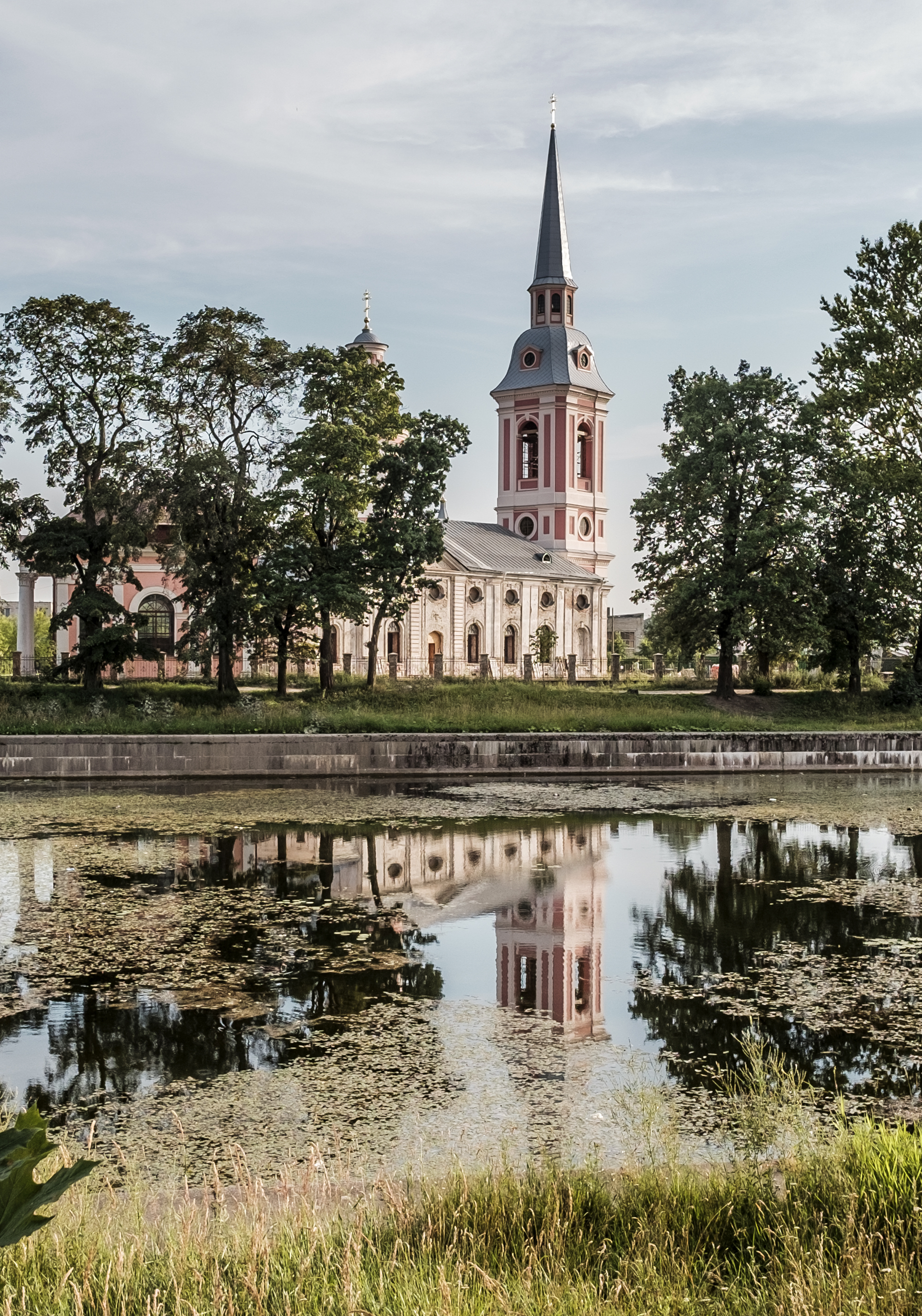 Благовещенский собор: Красная площадь, Шлиссельбург, Кировский район, Ленинградская область